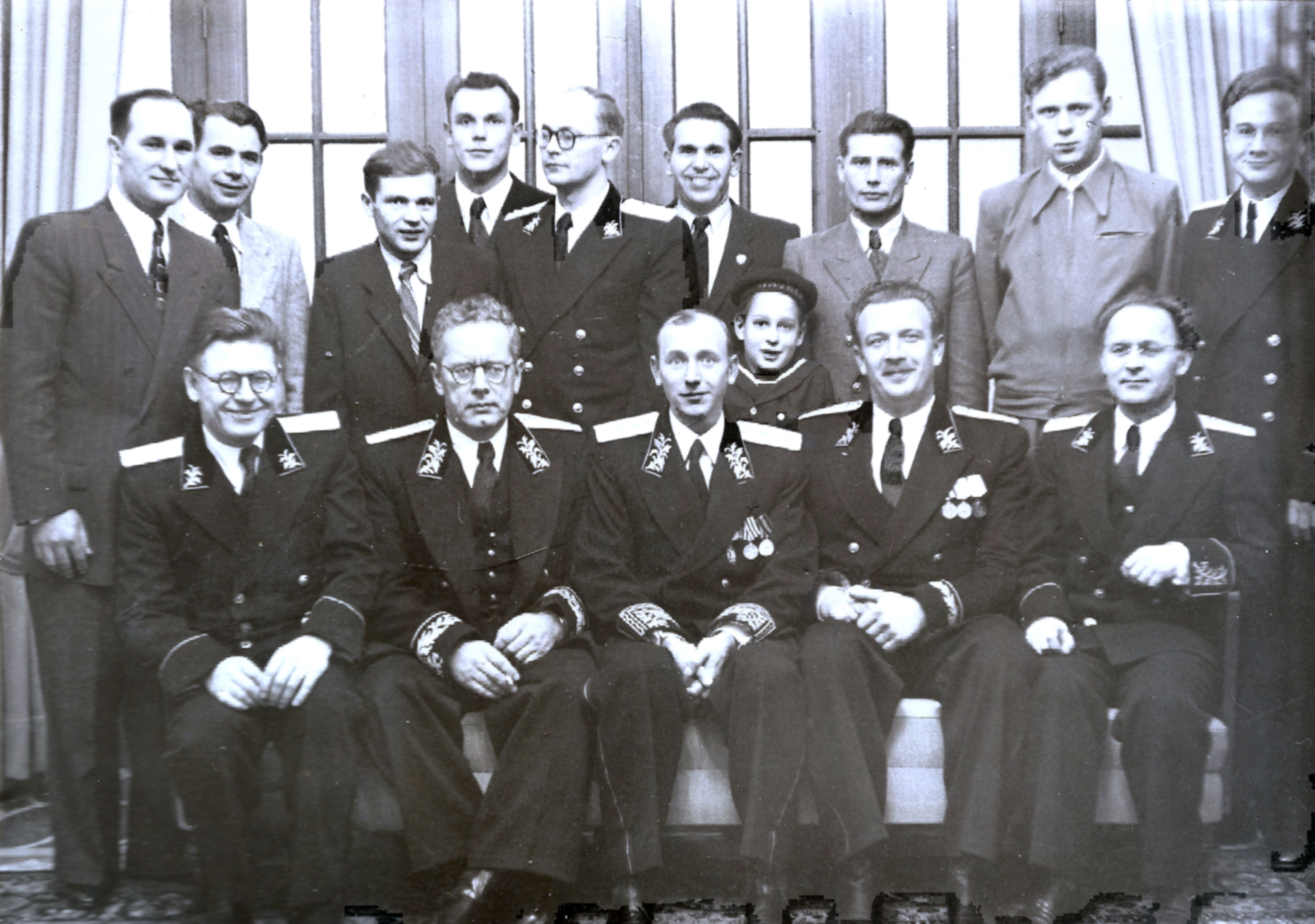 Сотрудники дипломатической миссии СССР в Израиле, 1949 г. Сидят: второй слева — М. Л. Мухин, третий слева — П. И. Ершов, второй справа — В. И. Рожков. Стоят: пятый справа — М. П. Попов, крайний справа — А. С. Семиошкин